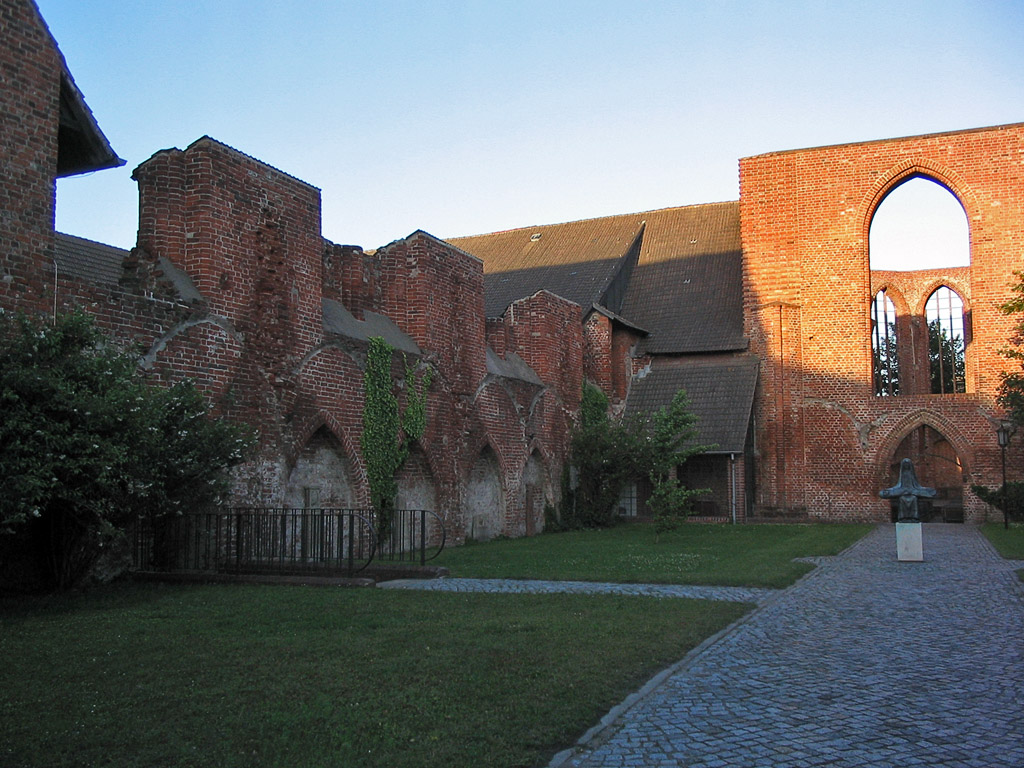 Beschreibung: Johanniskloster in Stralsund Fotograf: Darkone, 28. Juni 2004